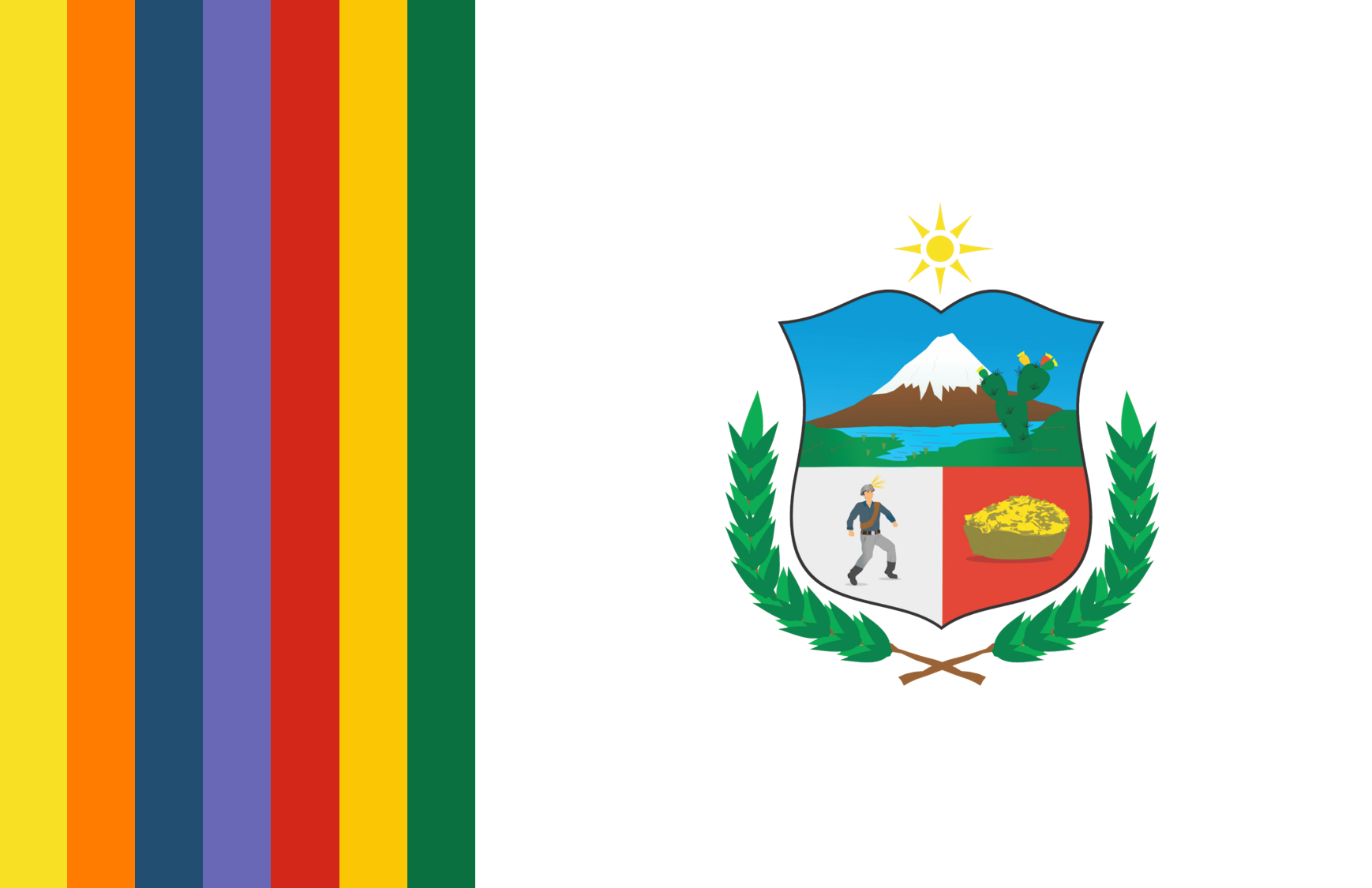 Apurimac region flag